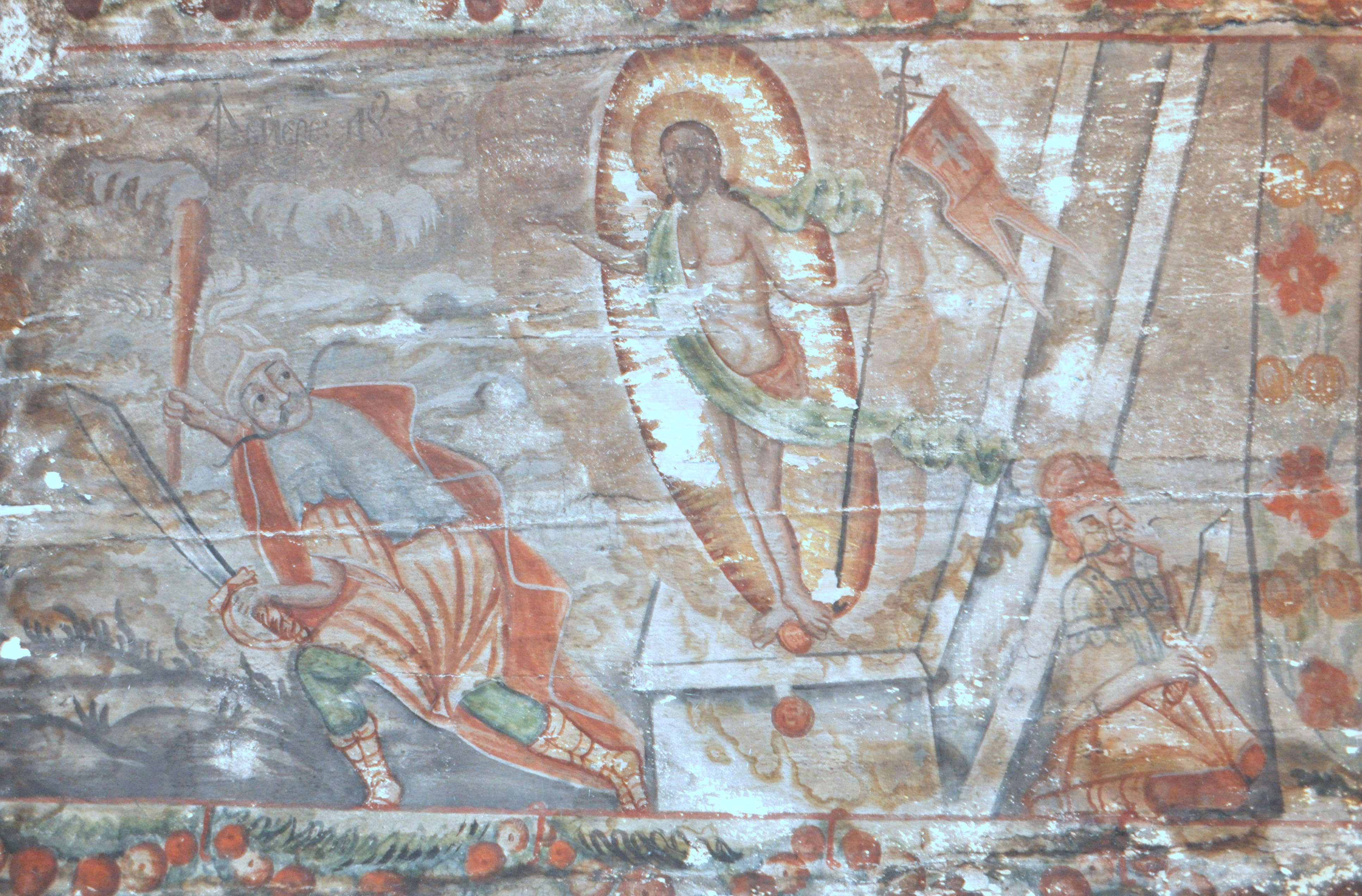 Biserica de lemn din Nadășu, județul Cluj